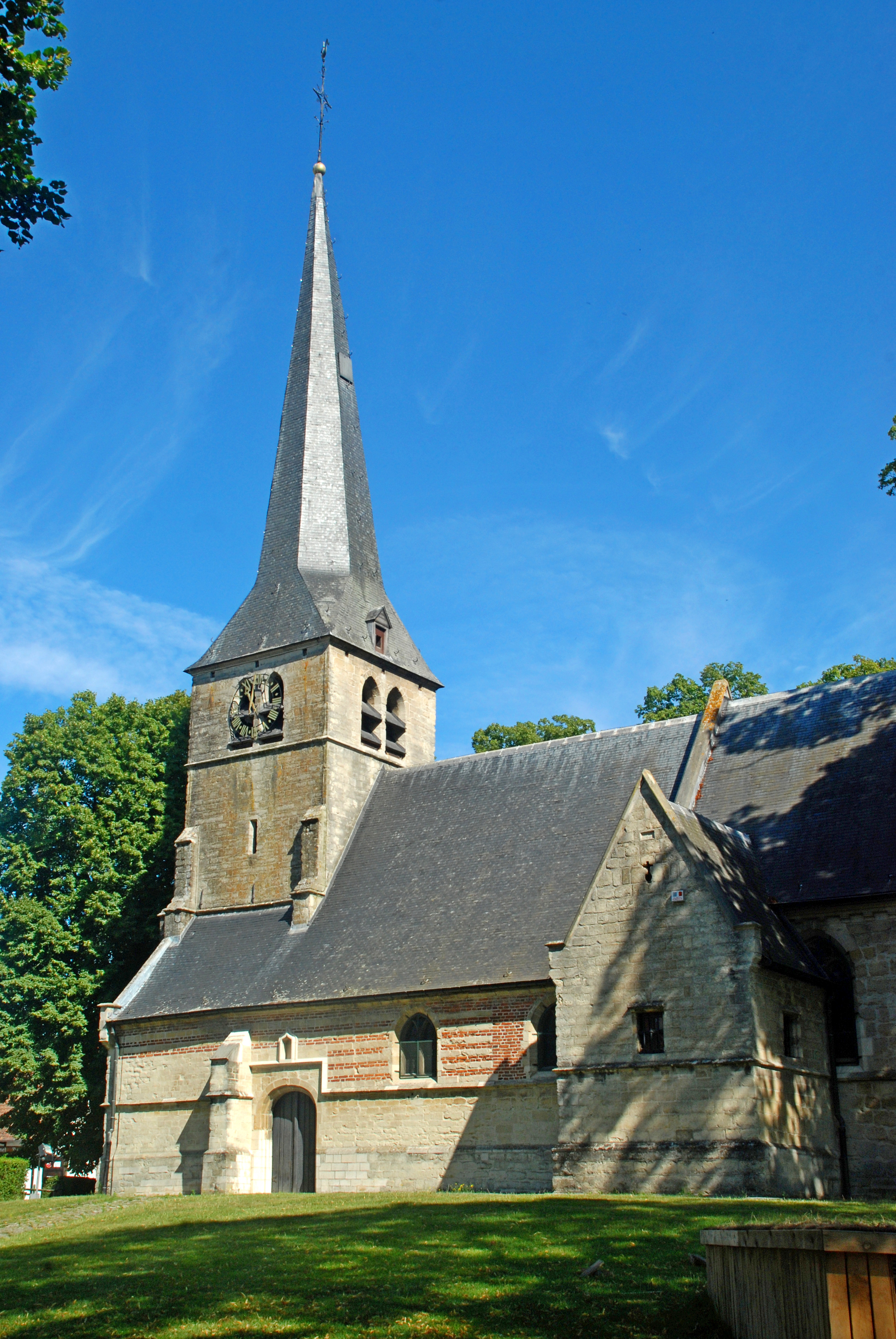 België - Vlaams Brabant - Sint-Anna-Pede - Sint-Annakerk